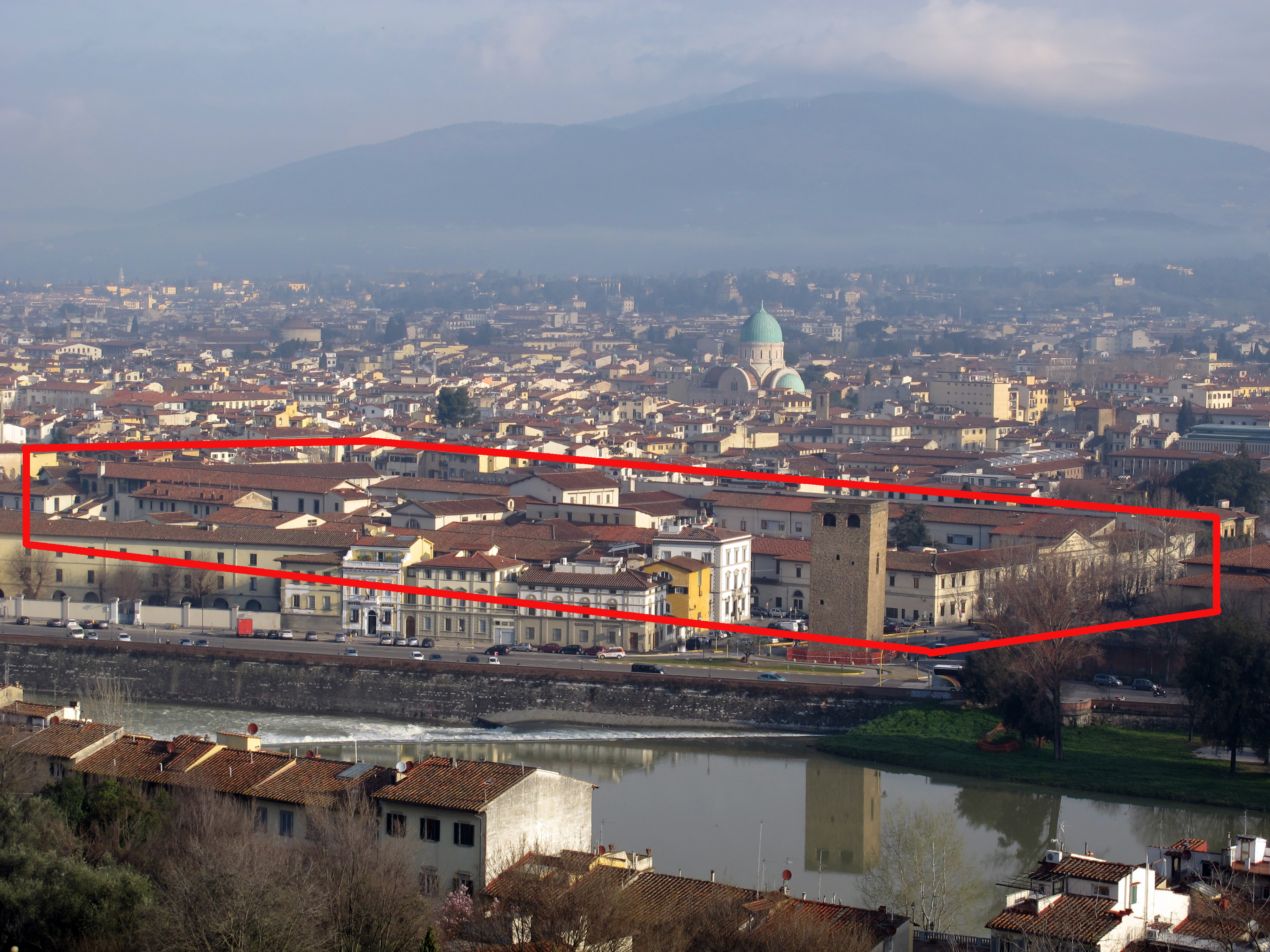 Villa la vedetta, vista 05 montedomini evidenziato